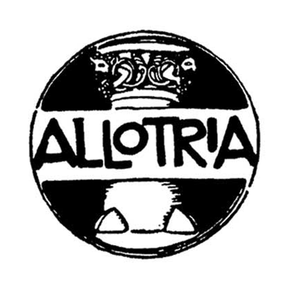 Das noch heute verwendete Logo der Allotria